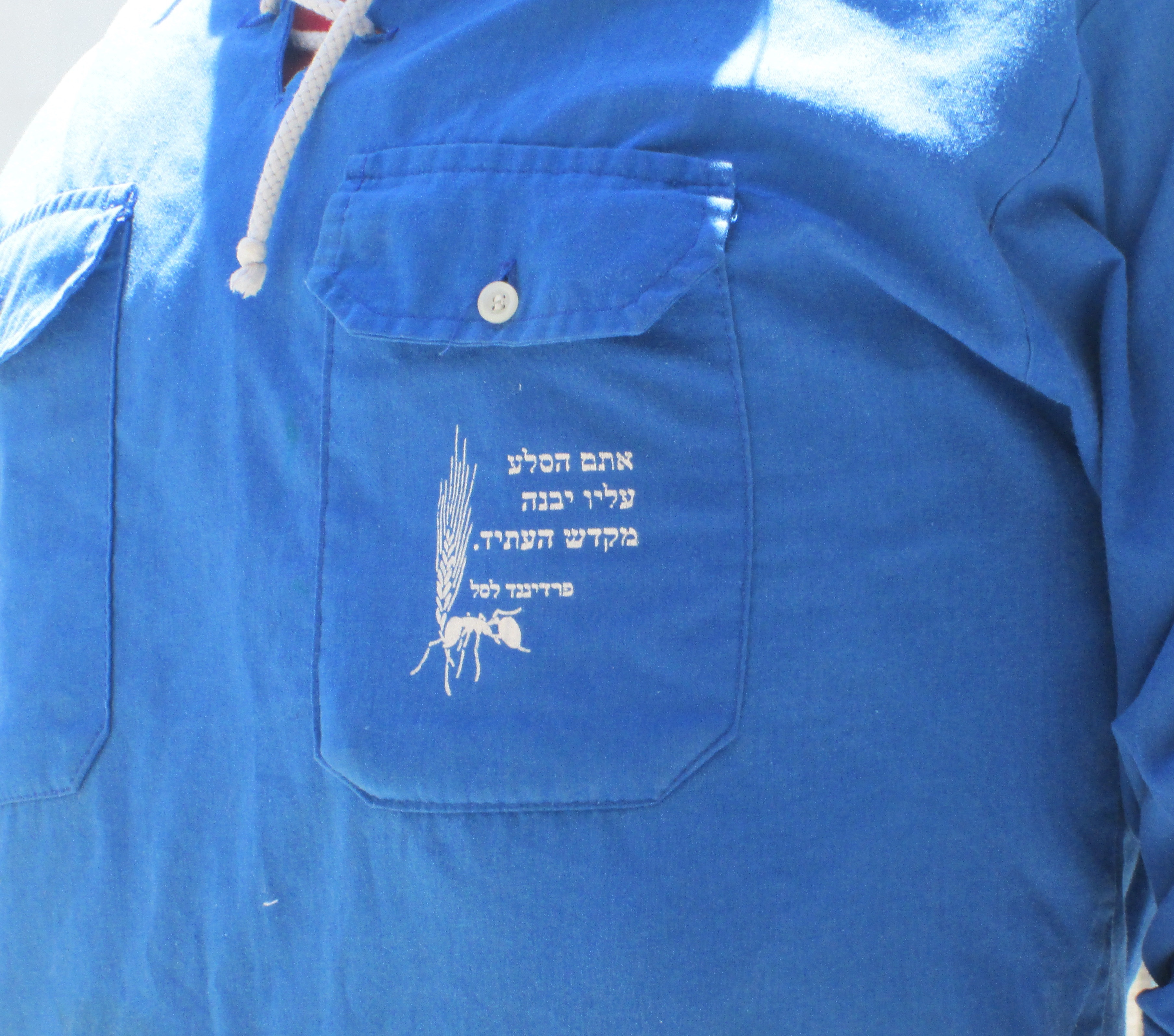 אמרתו של לסל